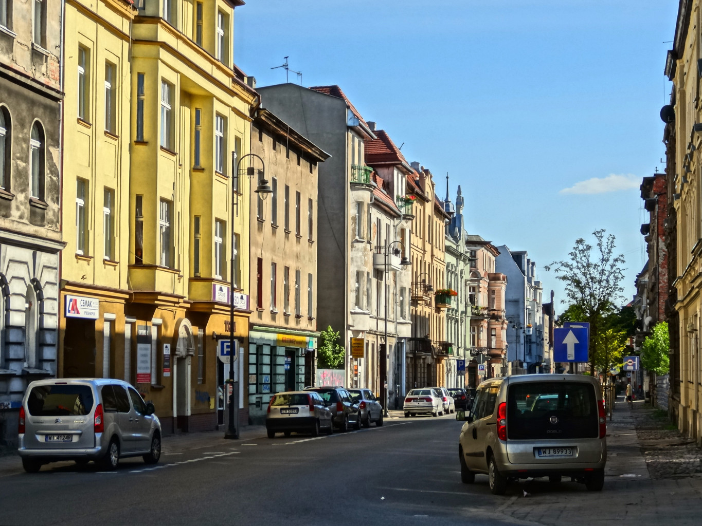 Ulica Pomorska w Bydgoszczy